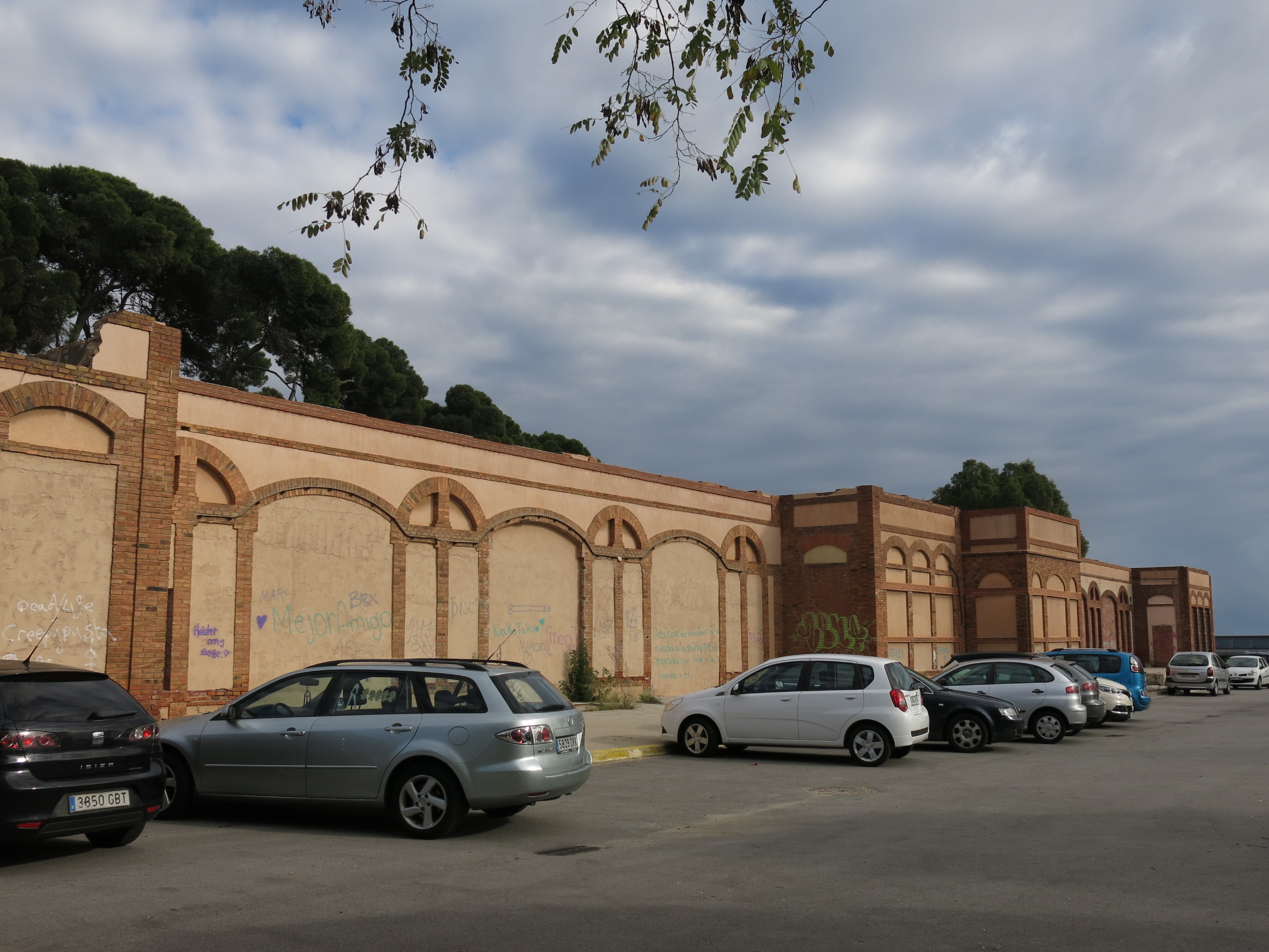 Hospital de l'Esperit Sant: Pavelló A (Santa Coloma de Gramenet)